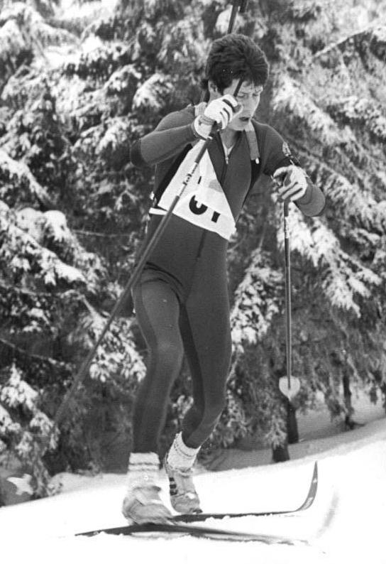 Frank-Peter Roetsch ADN-ZB Schaar 5.3.83 Bez. Suhl: Biathlon- Der zweifache Vize-Weltmeister Frank-Peter Roetsch (Foto) wurde bei den DDR-Biathlon-Meisterschaften in Oberhof neuer Titelträger über 10km bei den Senioren. Frank-Peter Roetsch (SG Dynamo Zinnwald) gewann sicher vor Holger Wick (ASK Vorwärts Oberhof) und Andreas Göthel (SG Dynamo Zinnwald). (Foto von einem früheren Wettkampf)